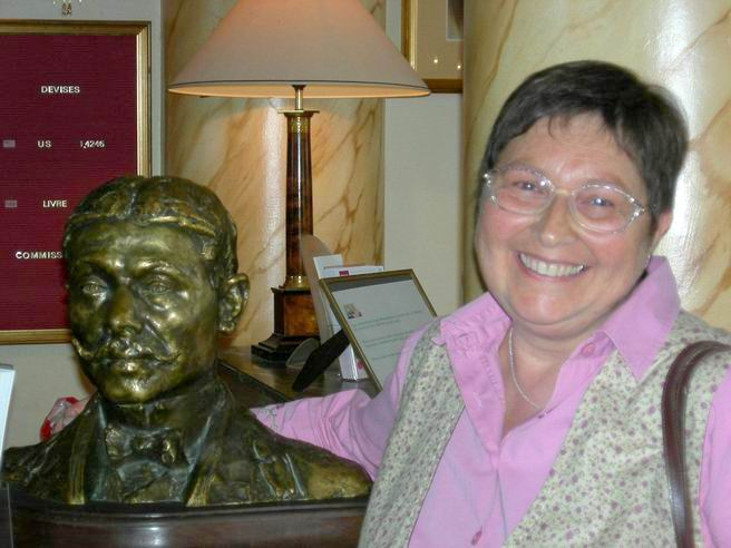 Nicole Tourneur Cabourg 2006